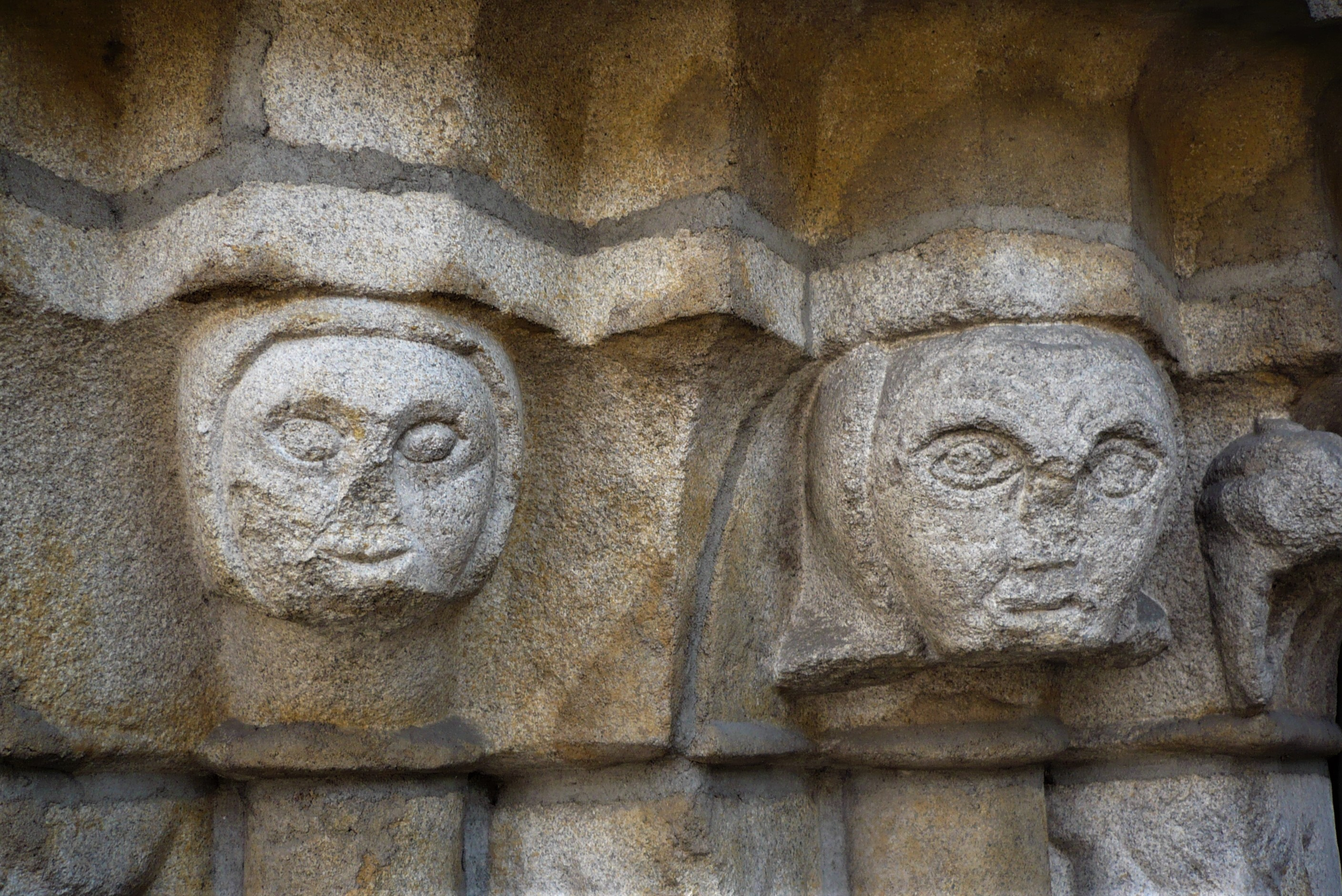 Głuchołazy. Kościół św. Wawrzyńca